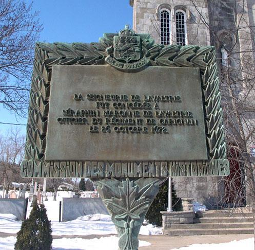 Plaque commémorative de Séraphin Margane de Lavaltrie fondateur de la ville de Lavaltrie au Québec.